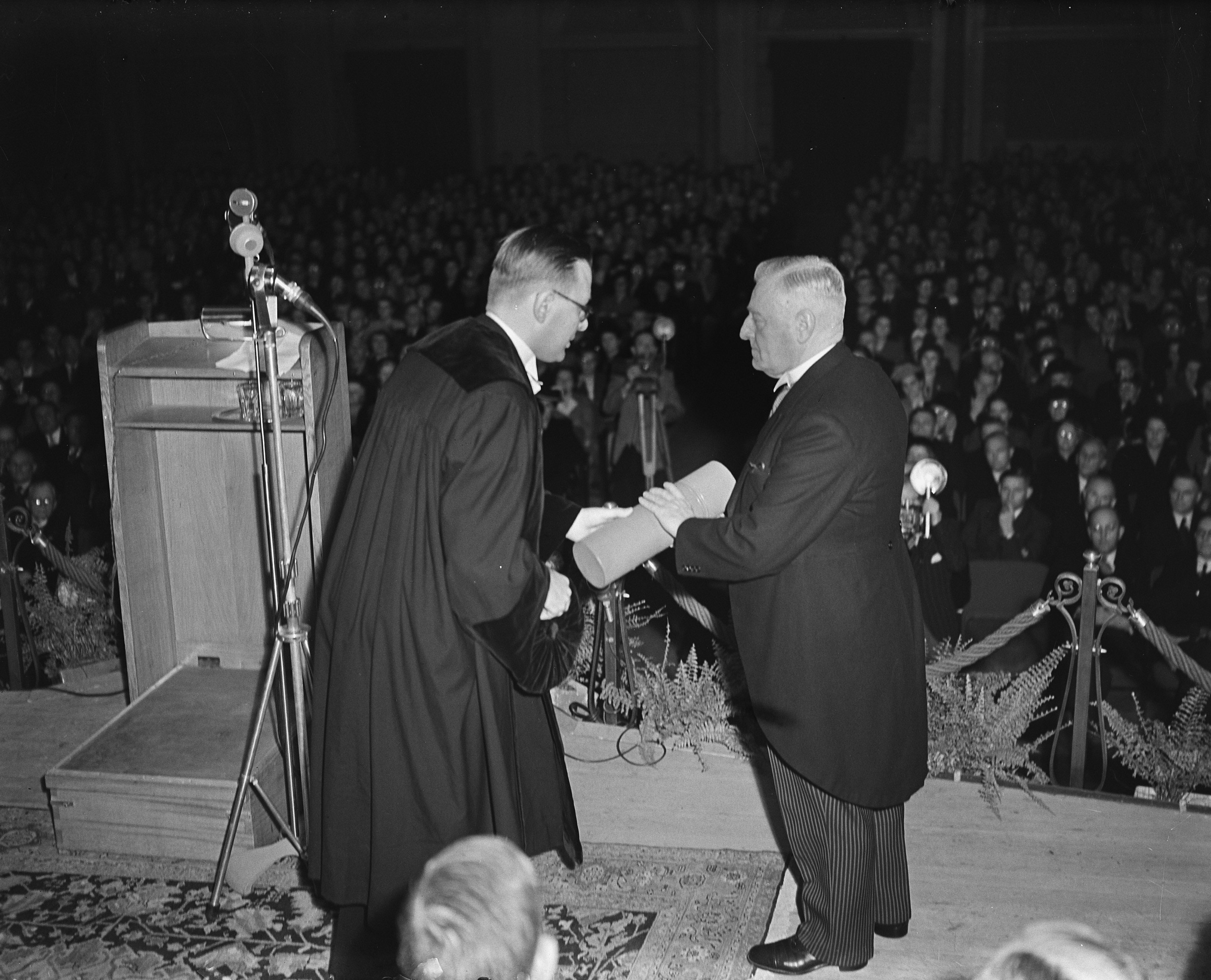 Collectie / Archief : Fotocollectie Anefo Reportage / Serie : [ onbekend ] Beschrijving : Erepromotie Jan Schouten in concertgebouw Datum : 20 oktober 1950 Trefwoorden : CONCERTGEBOUWen, Erepromoties Persoonsnaam : Jan Schouten Fotograaf : Noske, J.D. / Anefo Auteursrechthebbende : Nationaal Archief Materiaalsoort : Glasnegatief Nummer archiefinventaris : bekijk toegang 2.24.01.09 Bestanddeelnummer : 904-2534